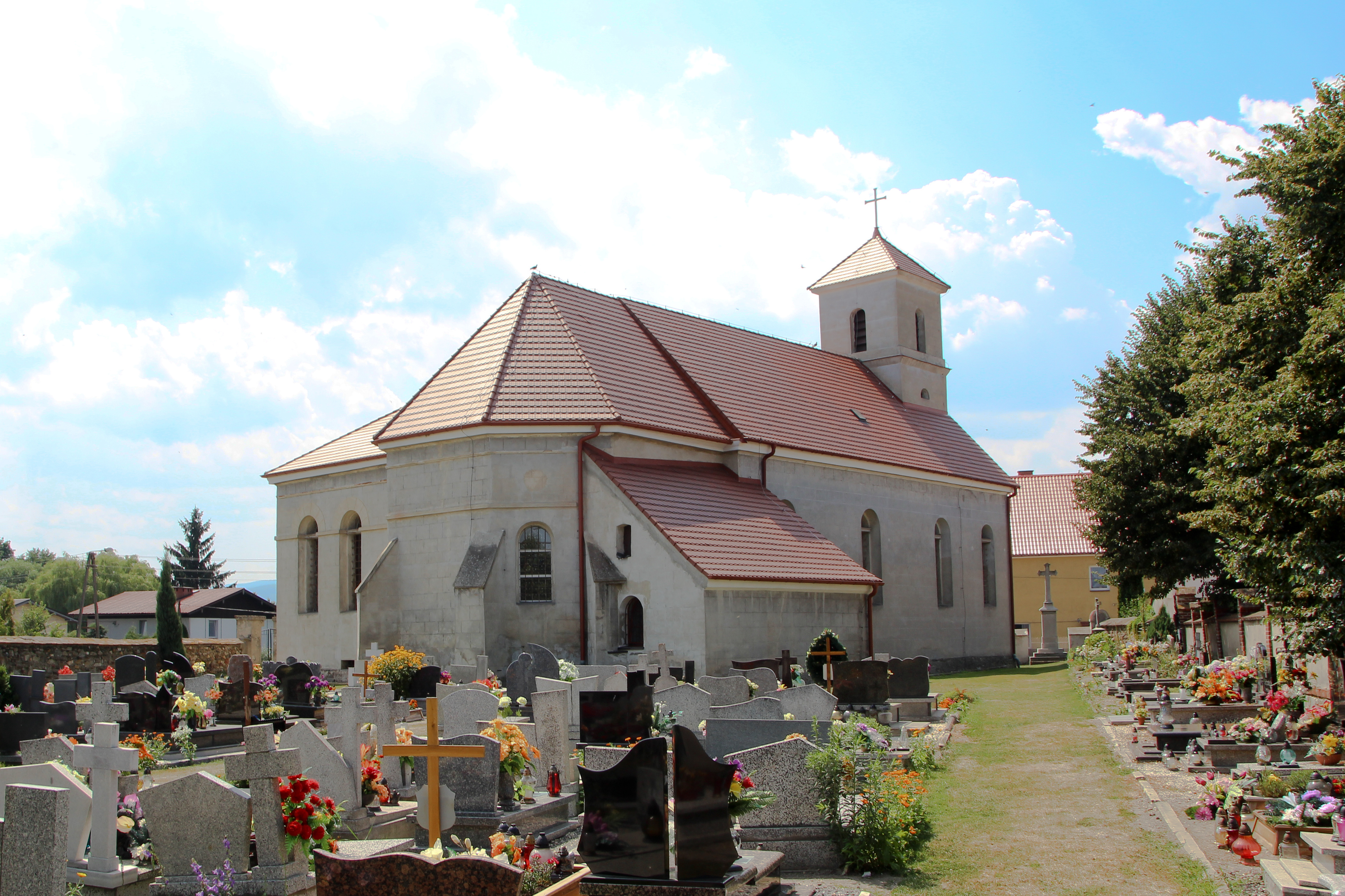 Ujeździec - rzymskokatolicki kościół parafialny p.w. św. Katarzyny, 1834